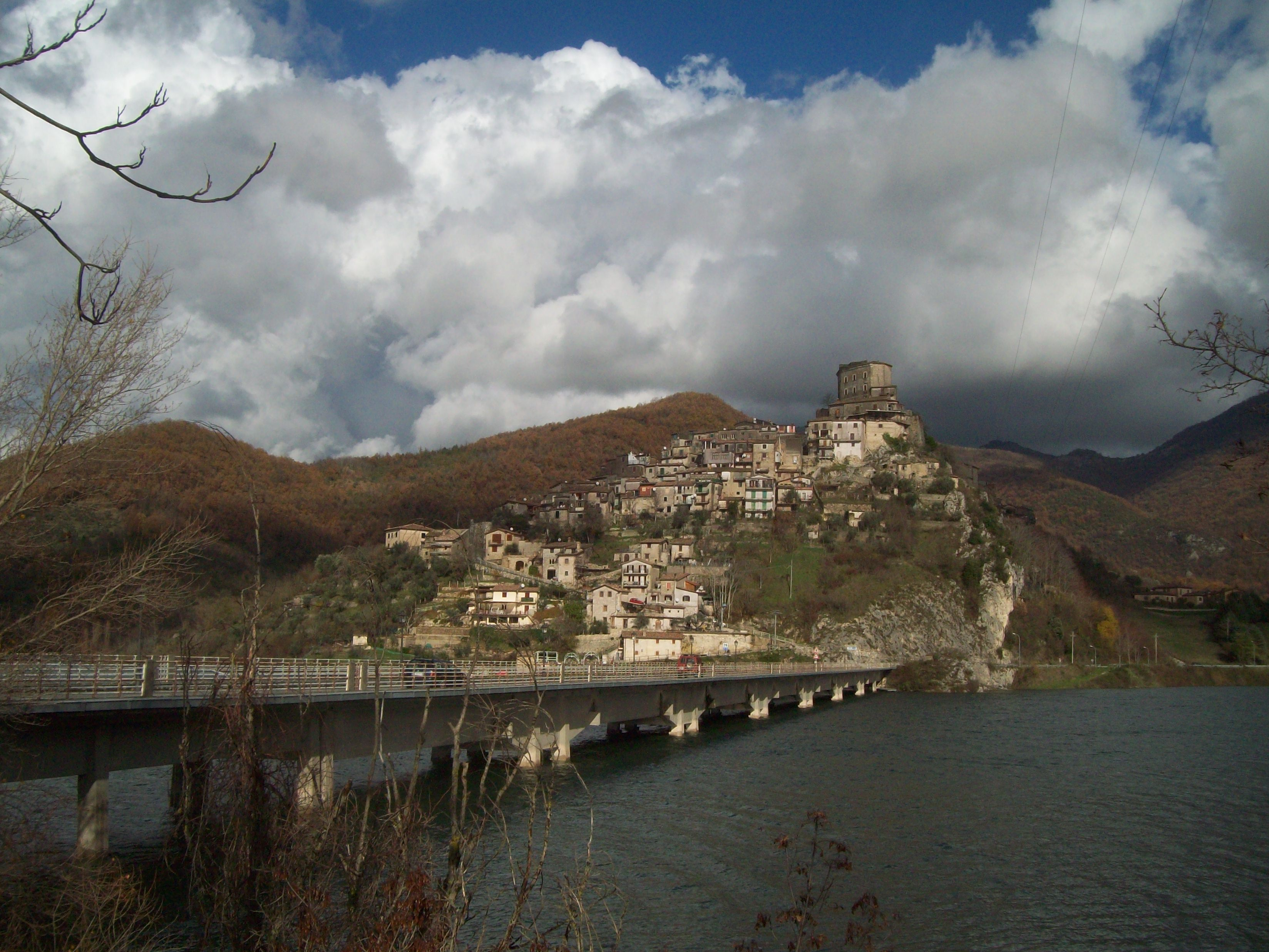 Lago del Turano - Castel di Tora - Italy